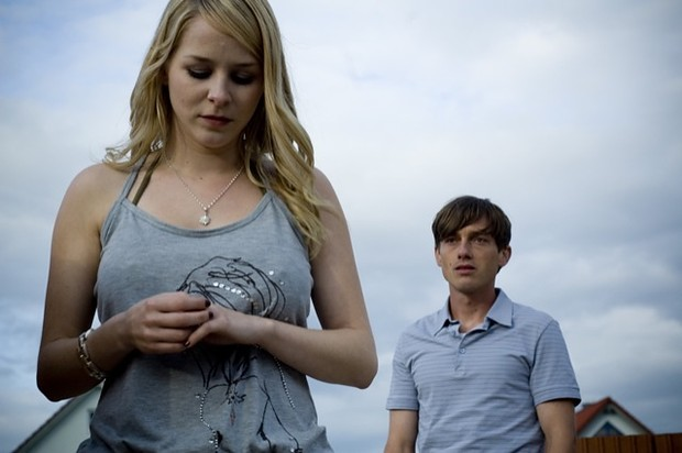 Pressefoto "Little Paris"